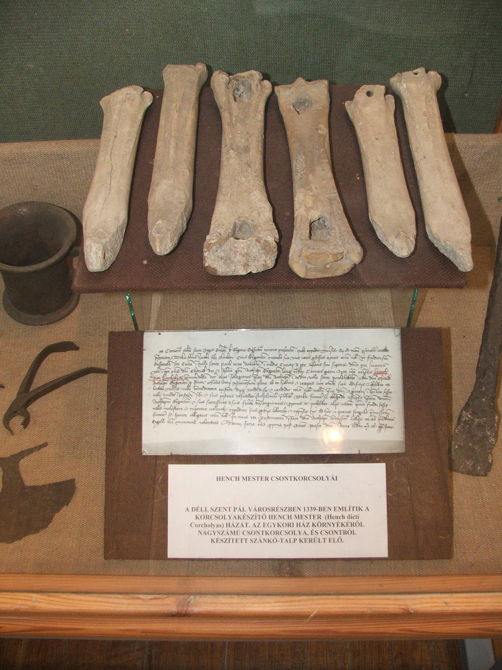 Hench mester korcsolyái az esztergomi Balassa Bálint Múzeumban. (1334)